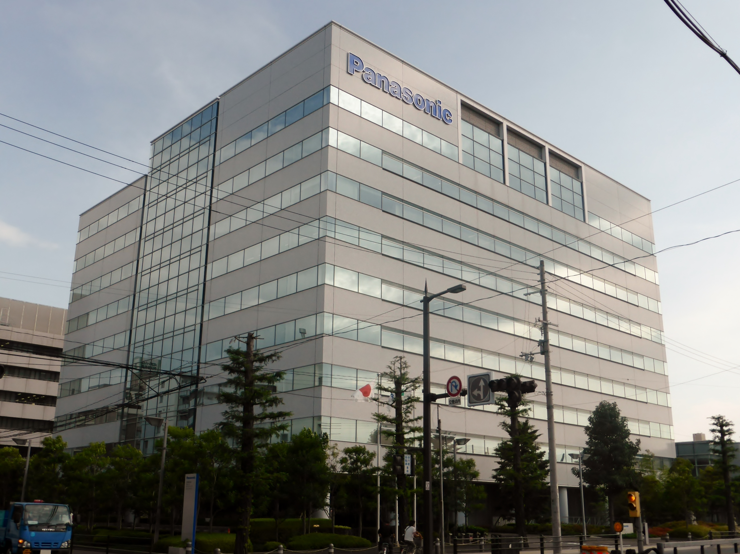 三洋電機株式会社本社を撮影